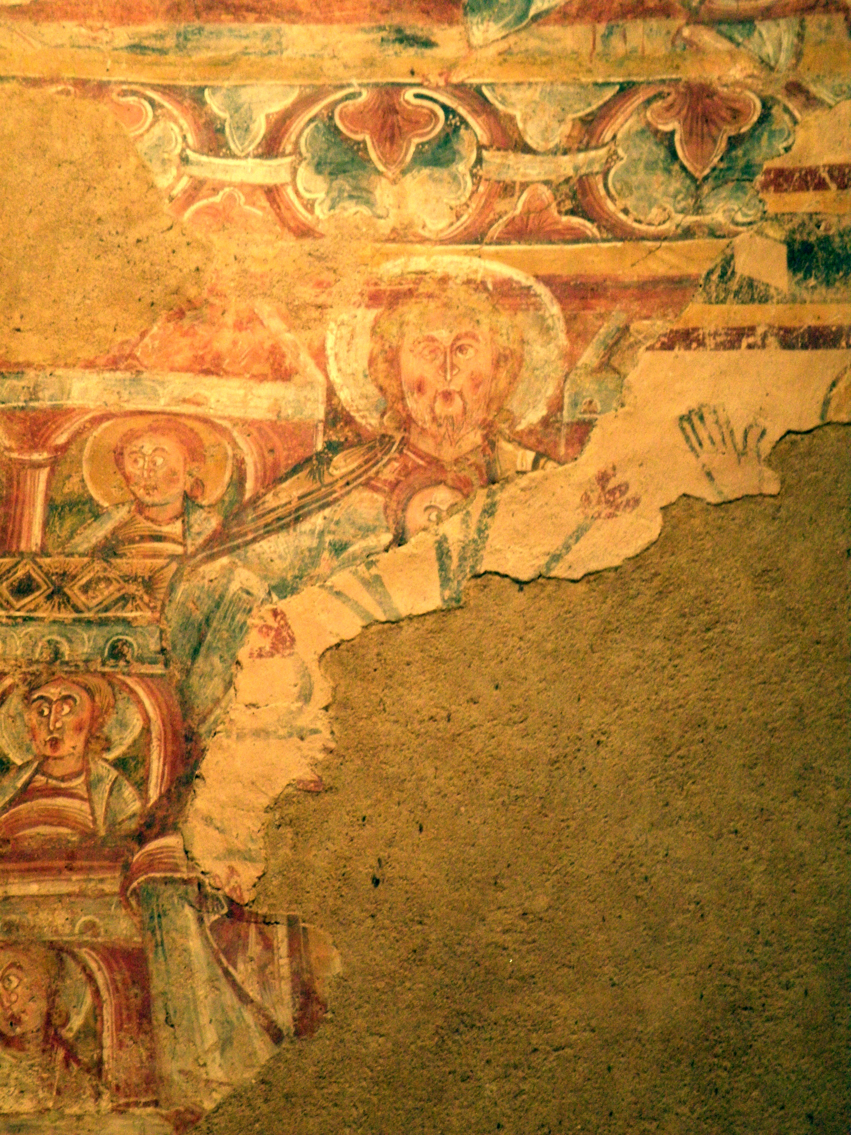 Abraham au paradis, tenant en son sein le pauvre Lazare